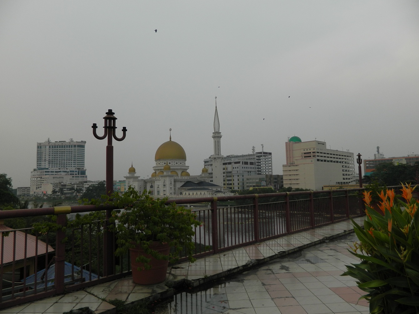 Klang Town